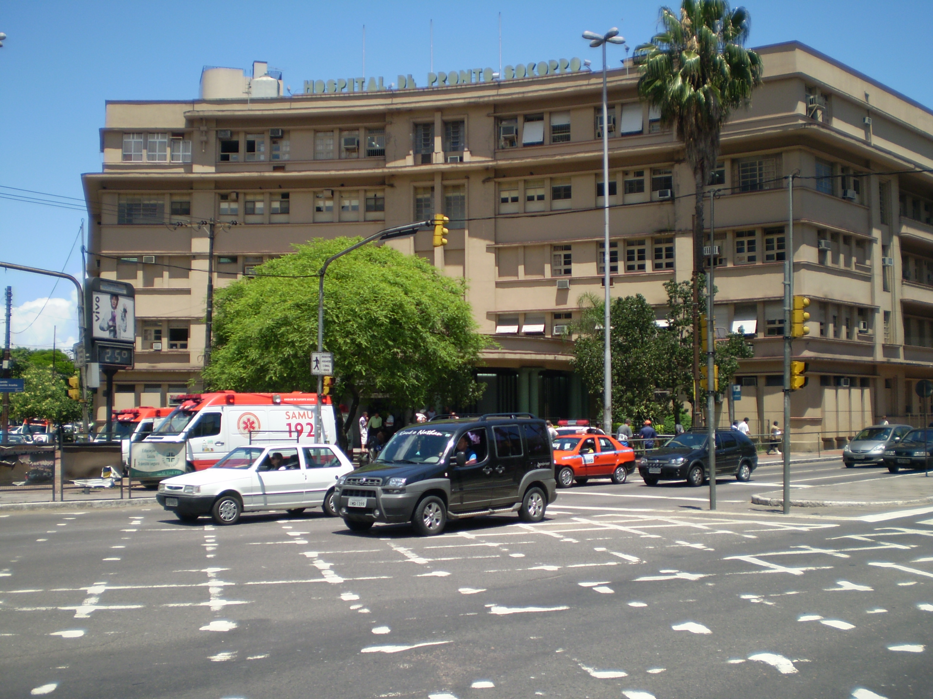 Pronto Secorro hospital, Farroupilha, Porto Alegre, Rio Grande do Sul, Brazil.